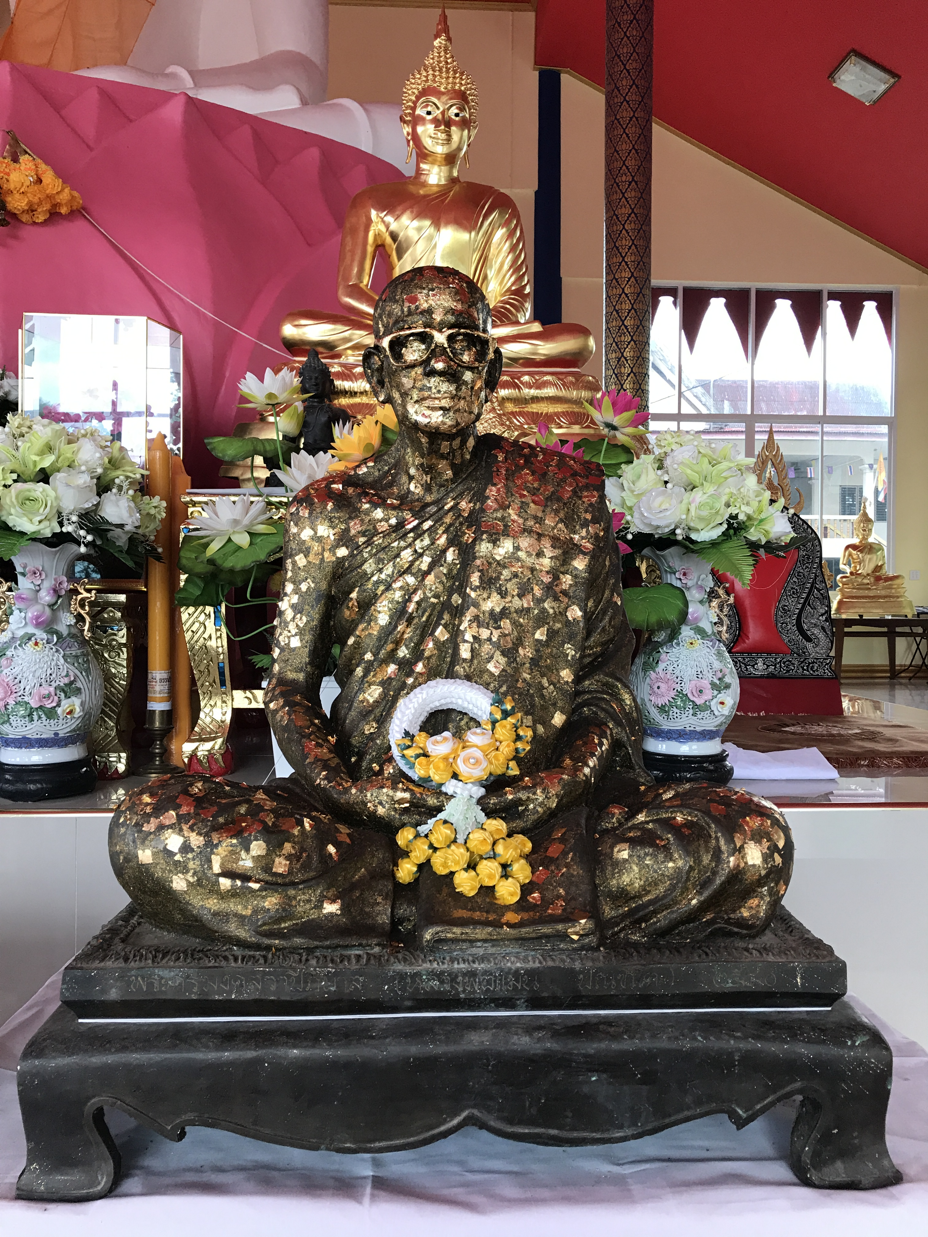 พระครูมงคลวาปีภิบาล (แม้น ปณฺฑิโต